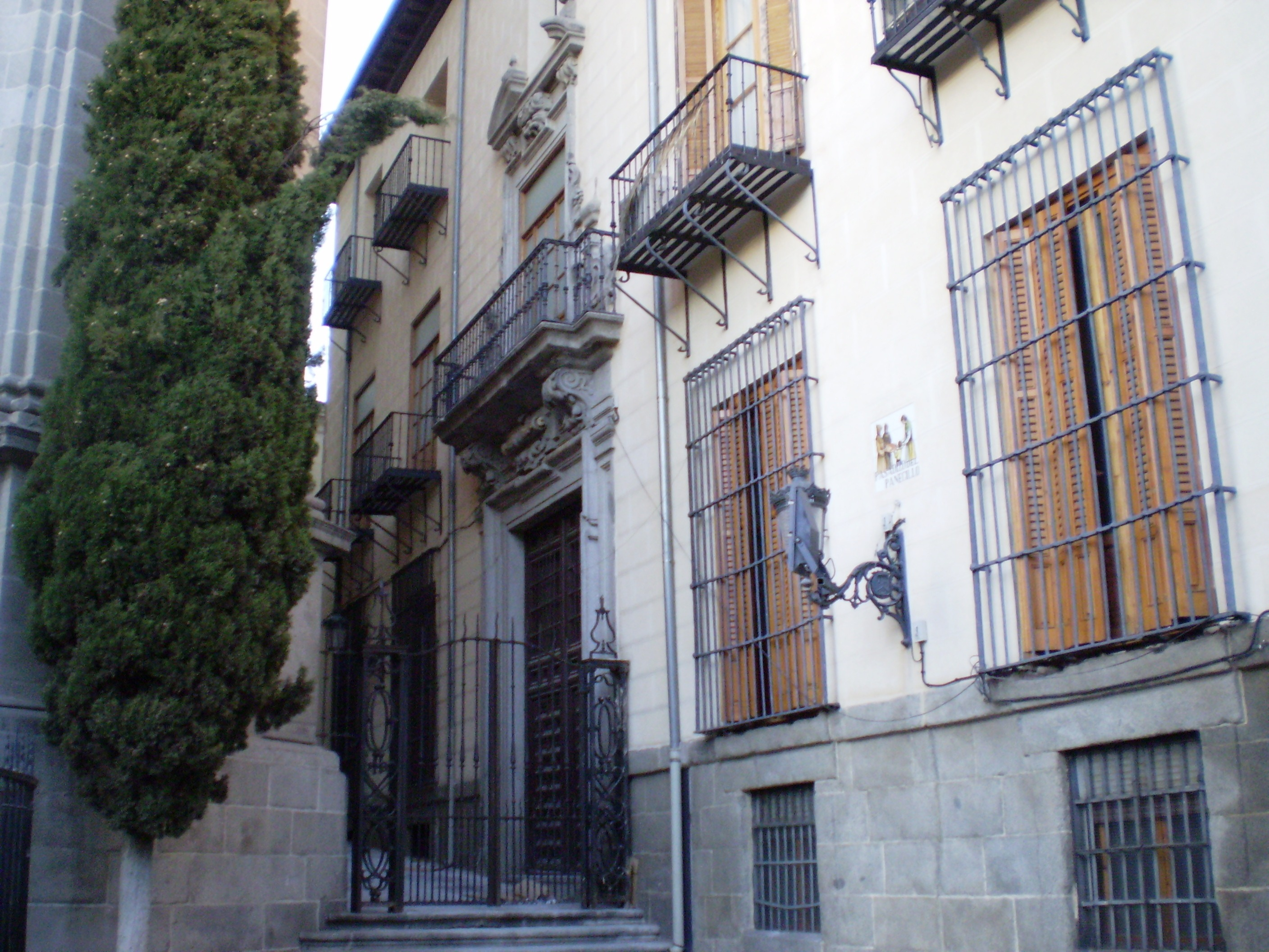 Palacio Arzobispal. Madrid, Spain